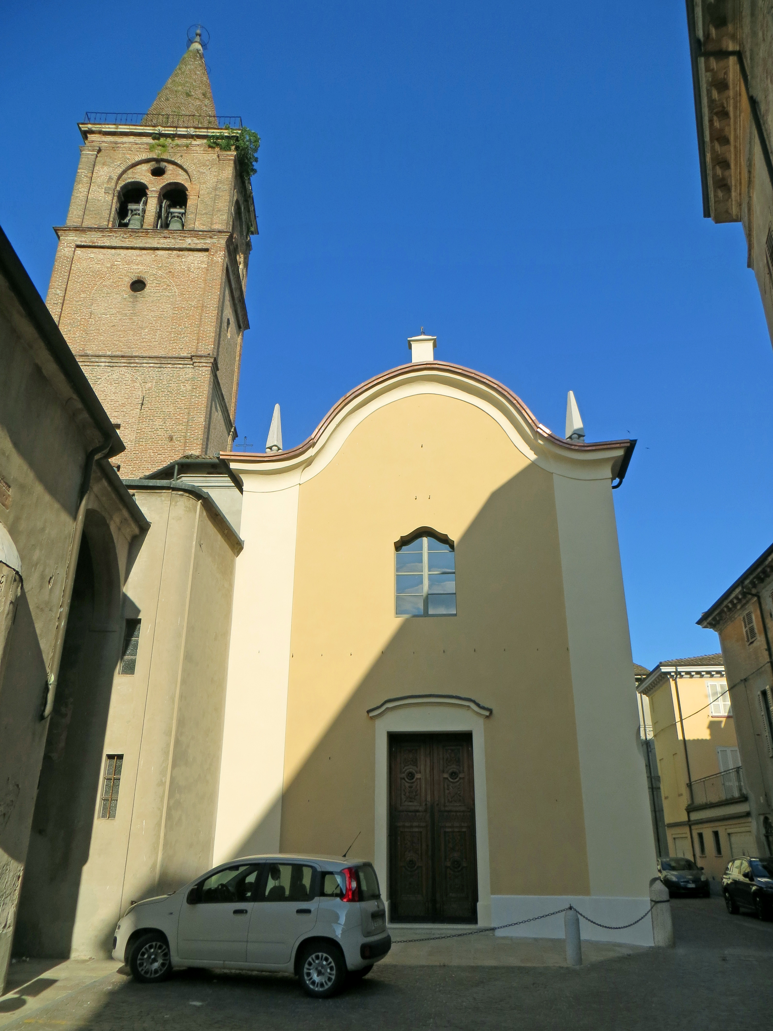 Oratorio della Santissima Trinità (Busseto) - facciata